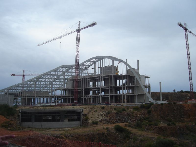 Cidade da Cultura, Santiago de Compostela. Galiza